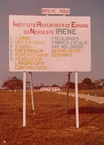 Placa Original do Instituto Adventista de Ensino do Nordeste (IAENE), atualmente Faculdades Adventistas da Bahia